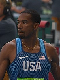 Christian Taylor lors du concours du triple saut au jo de Rio 2016